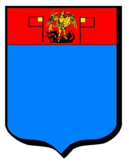 blason de Beauval (Belgique)